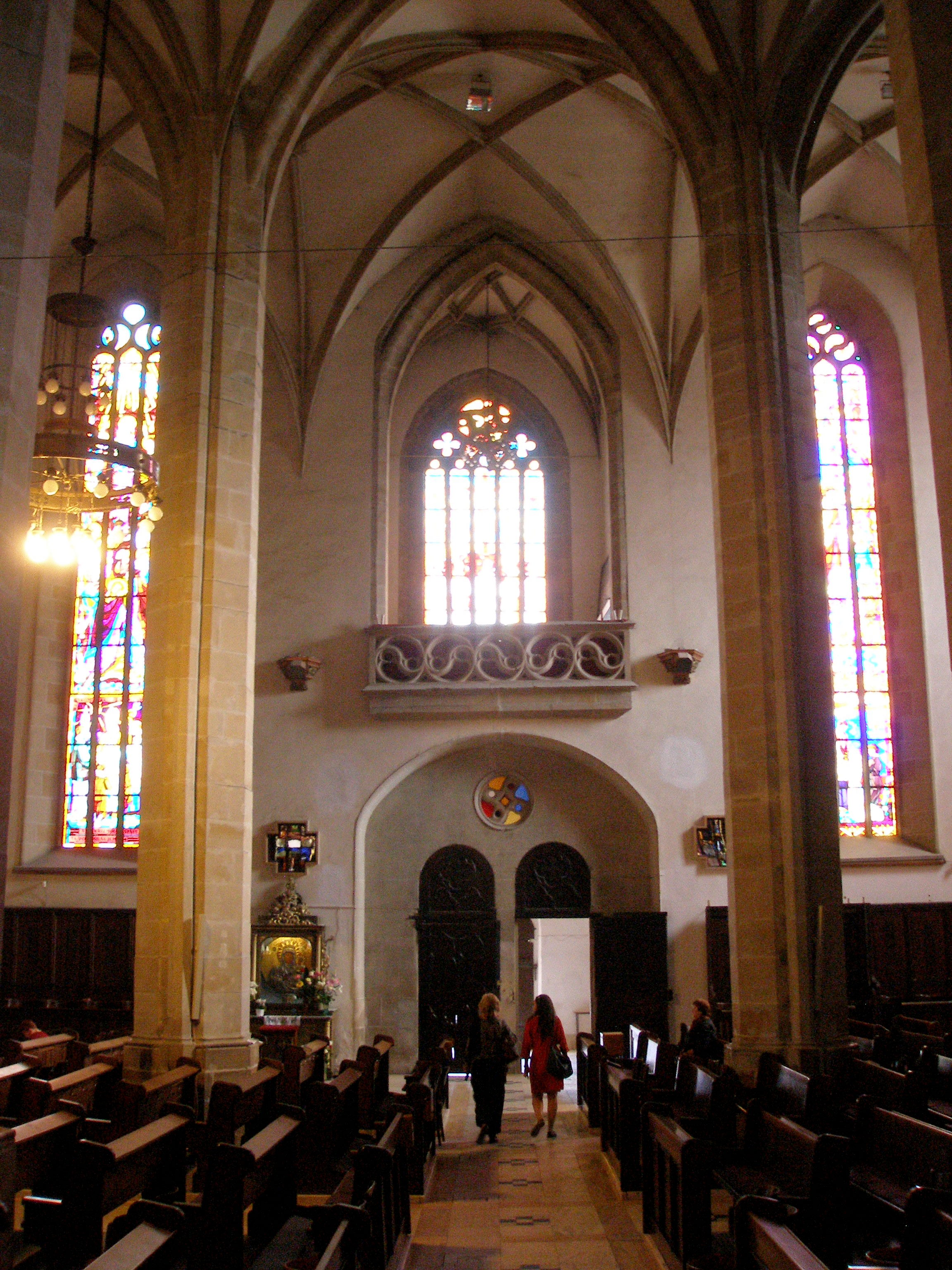 Interiér rímskokatolíckej konkatedrály v Dóme svätého Mikuláša. Mesto Prešov.